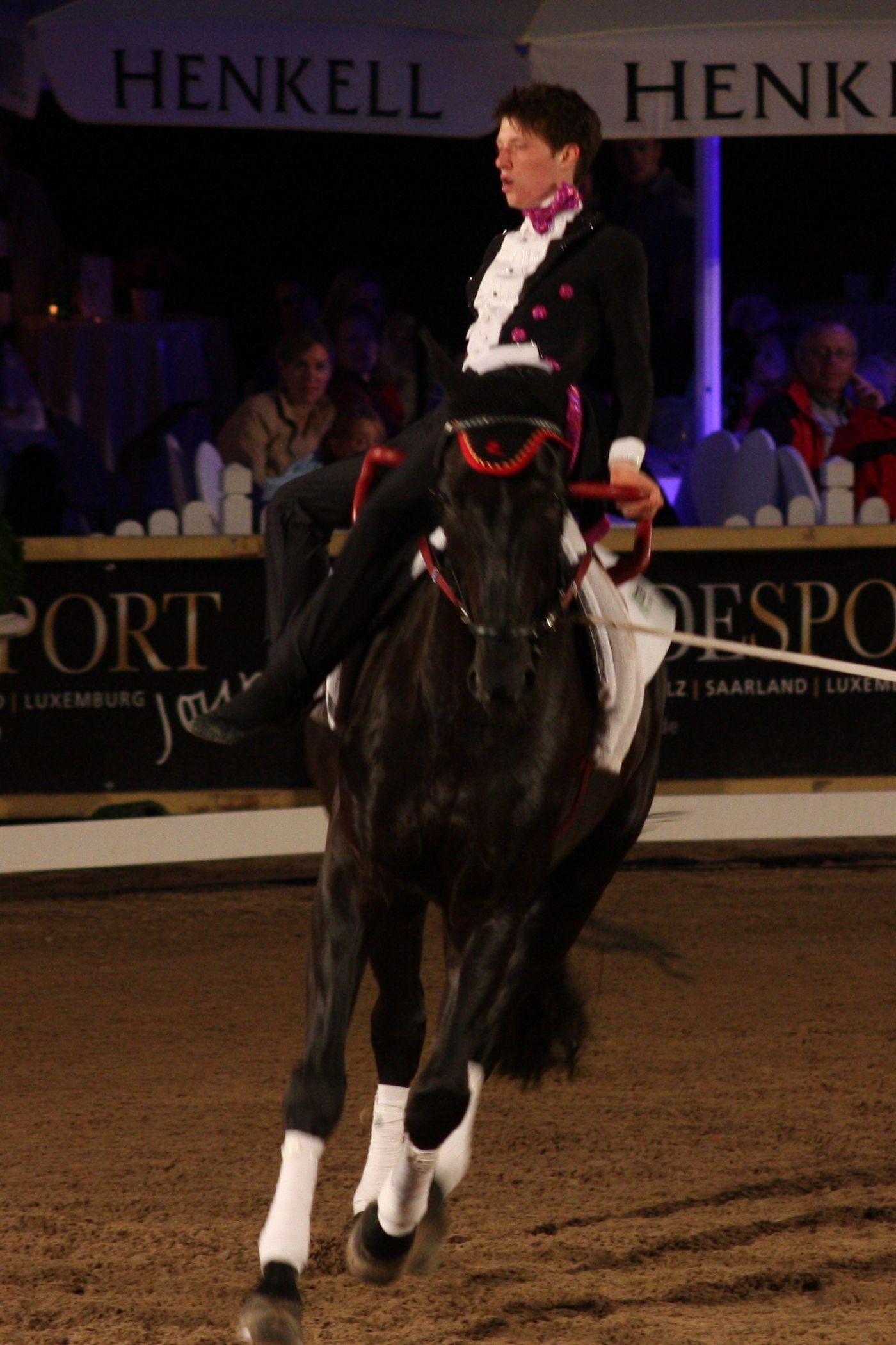 77. Internationales Pfingstturnier Wiesbaden 2013, CVI *** Voltigieren, Jannik Heiland mit Rockard H Personality rights warning Although this work is freely licensed or in the public domain, the person(s) shown may have rights that legally restrict certain re-uses unless those depicted consent to such uses. In these cases, a model release or other evidence of consent could protect you from infringement claims.